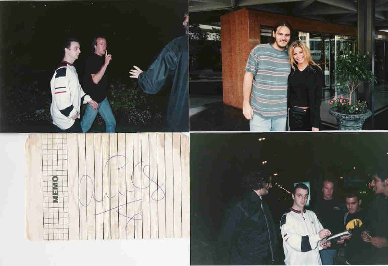 Un poco de cholulaje...lástima que ahora cambiaron el bajista...